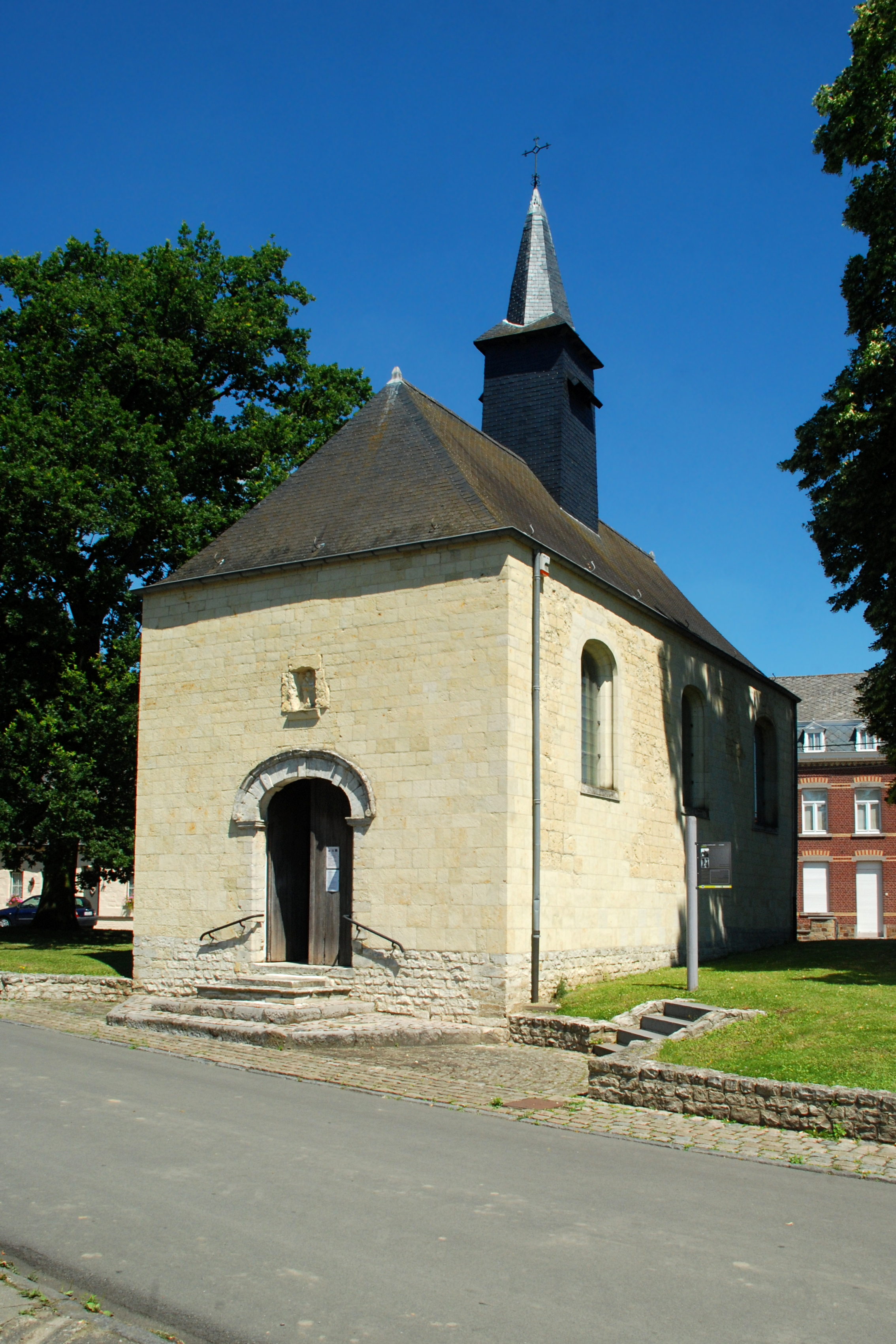 Belgique - Brabant wallon - Hélécine - Linsmeau - Chapelle Notre-Dame de la Colombe